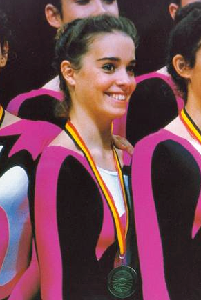 Lorea Elso en el podio del Mundial de Bruselas en 1992.